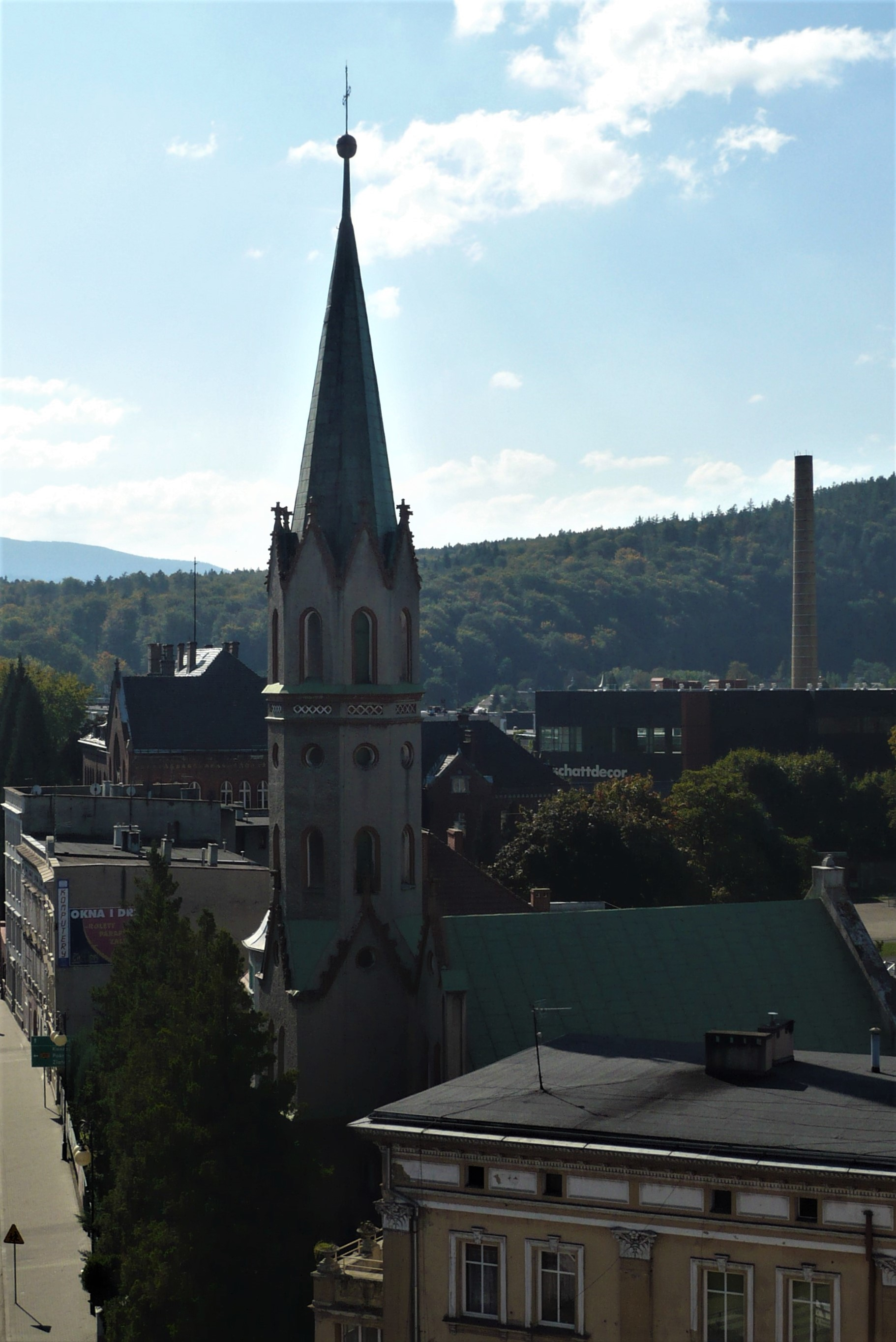 Głuchołazy. Kościół św. Franciszka